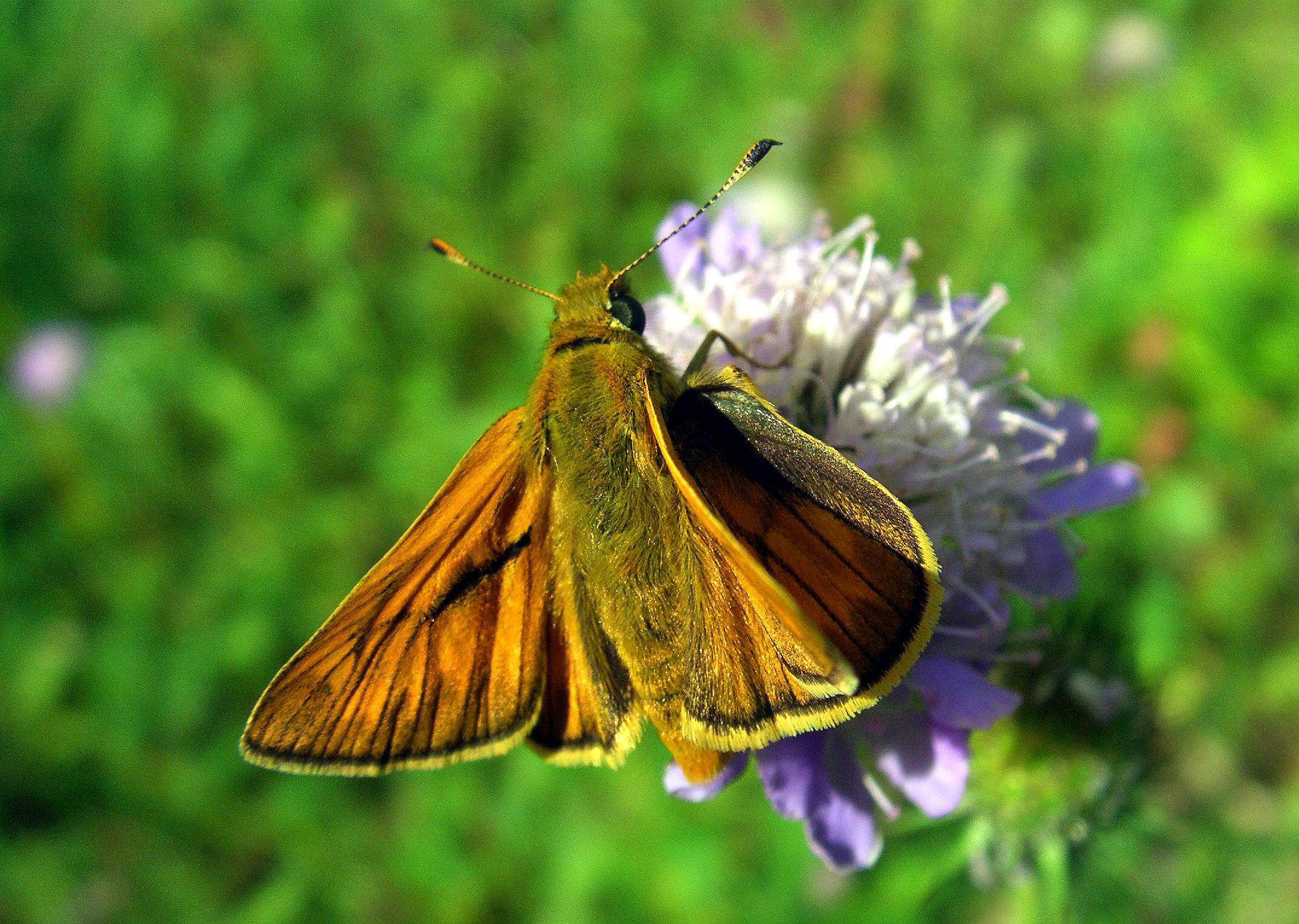 Ochlodes sylvanus, male